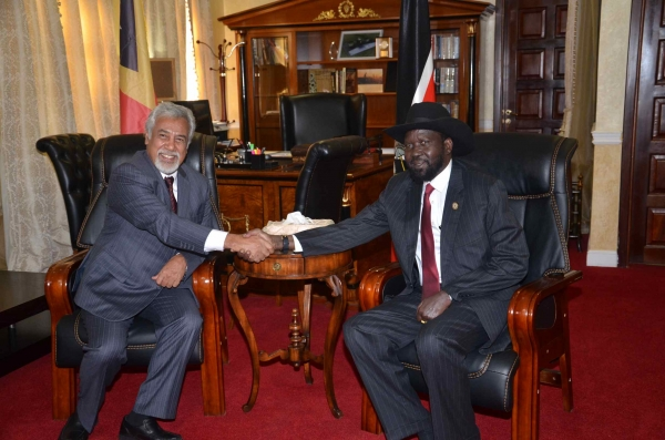 Premierminister Osttimors Xanana Gusmão und Präsident des Südsudans Salva Kiir Mayardit